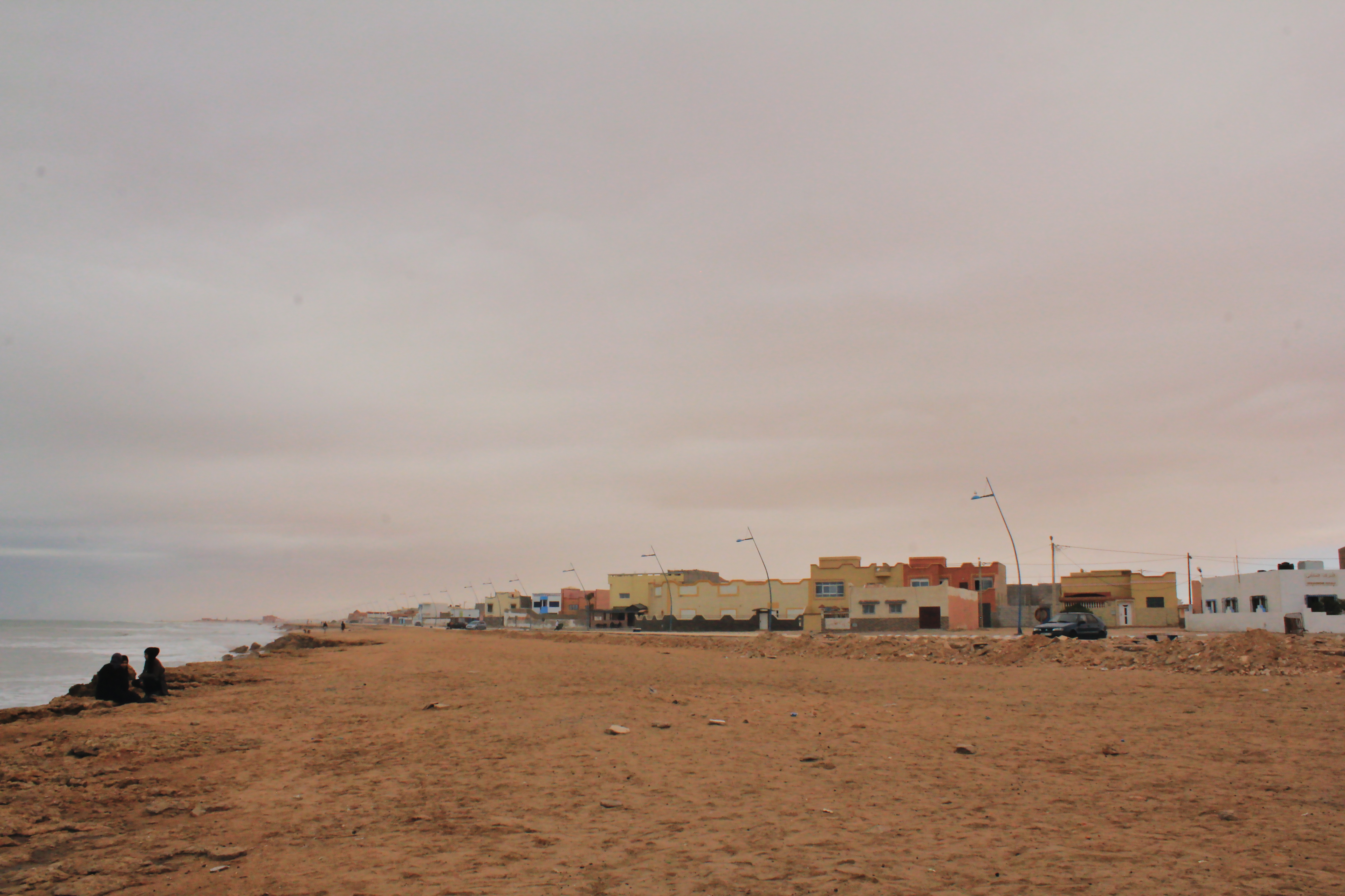 شاطئ مدينة فم الواد، التابعة لمدينة العيون، المغرب